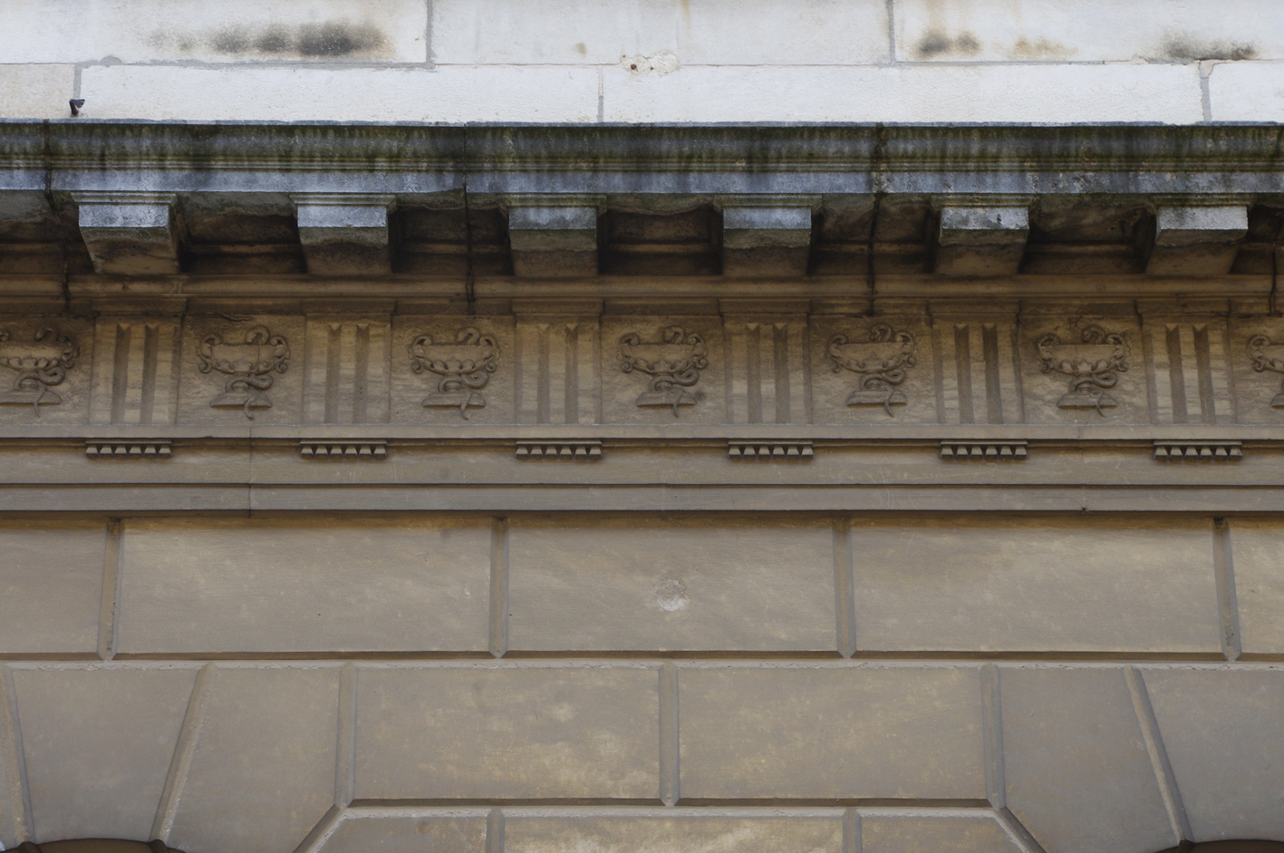 Détail de la frise de triglyphes et de métopes sur la façade de l'école de médecine et de pharmacie de Poitiers, XIXe siècle.